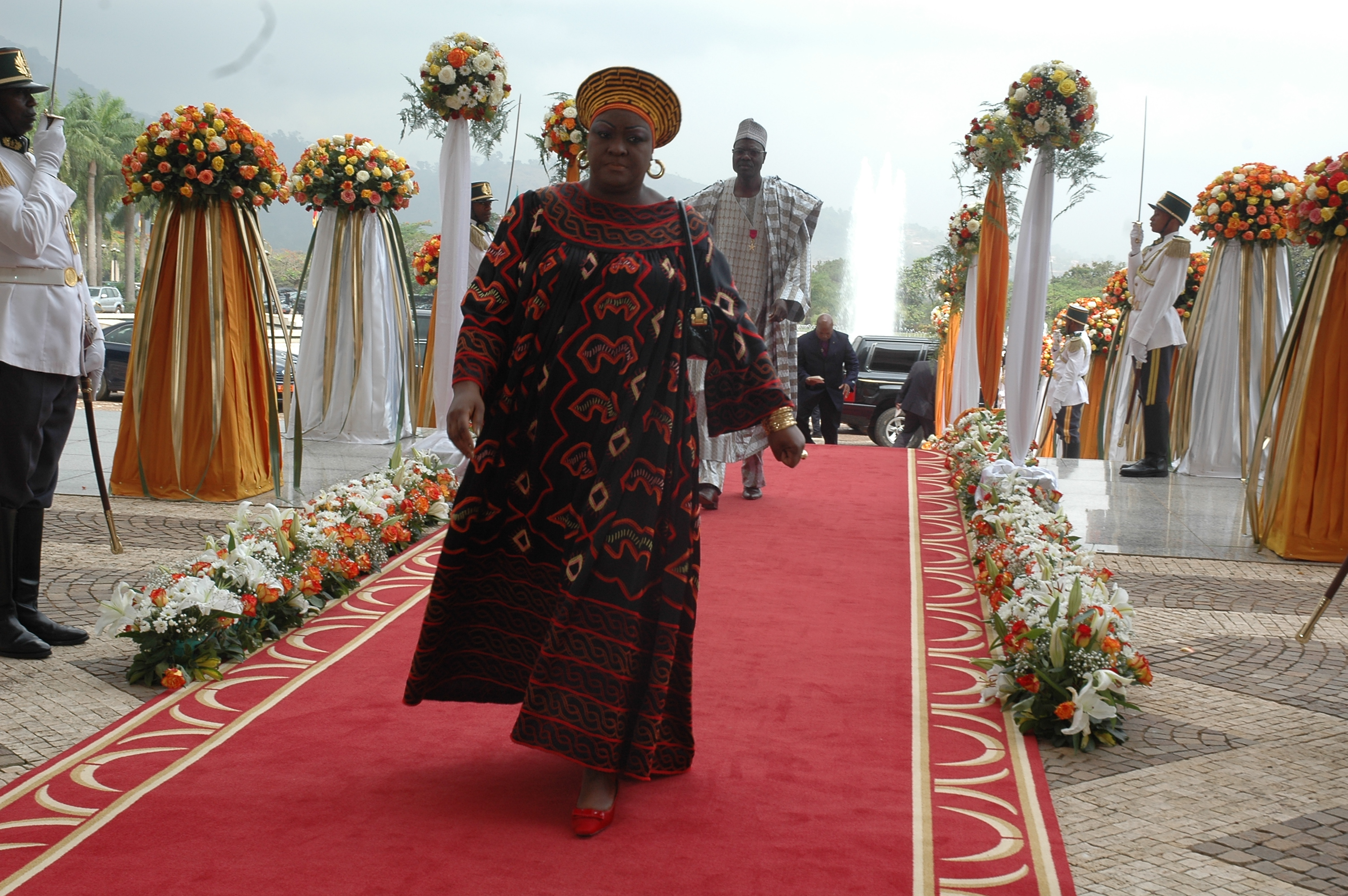 Mme Ama Tutu Muna à l'entrée du palais de l'unité lors de la cérémonie de présentation des voeux au Président Paul Biya